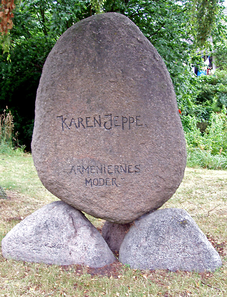 Mindesten for Karen Jeppe i Gylling, Århus Amt, Danmark Karen Jeppe var nødhjælpsarbejder, der reddede utallige mennesker (primært børn) fra forfølgelse og nød under det tyrkiske folkedrab på armernierne i 1915-17.[1]